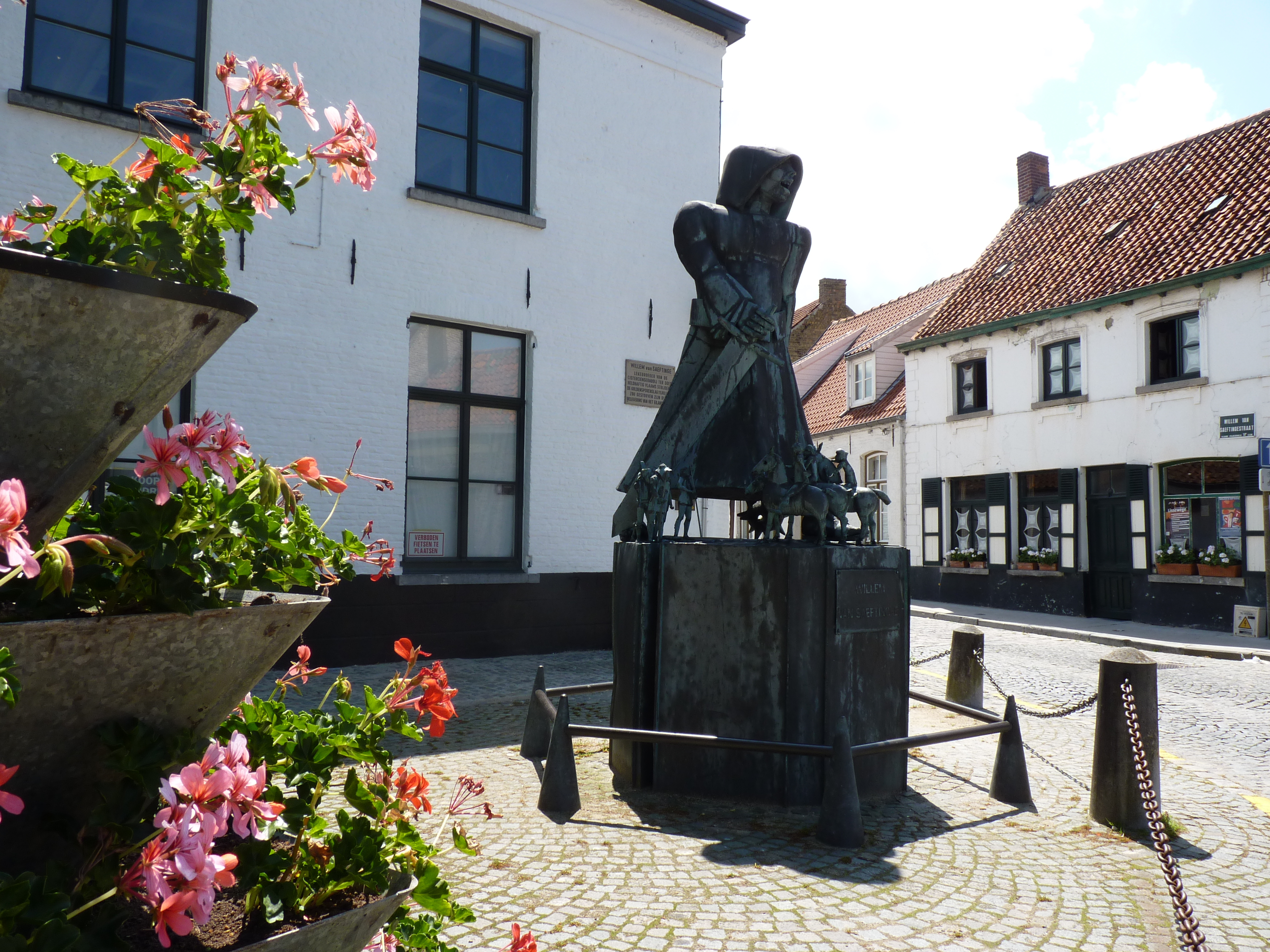 Standbeeld van Lekebroeder van Saeftinghe in Lissewege